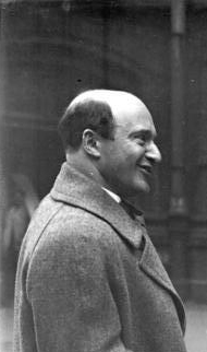 Title: Erich Kleiber People in the image: Kleiber, Erich Prof.: Generalmusikdirektor, Deutschland Factual corrections and alternative descriptions are encouraged separately from the original description. Additionally errors can be reported at this page to inform the Bundesarchiv. Original historic description: Der weltberühmte Komponist und Dirigent der Mailänder Scala ist mit seinem philharmonischen Orchester in Berlin eingetroffen! Der weltberühmte Komponist Arturo Toscanini (rechts) wird auf dem Anhalter Bahnhof in Berlin von dem General-Musikdirektor der staatlichen Opern Dr. Kleiber (inks) empfangen.